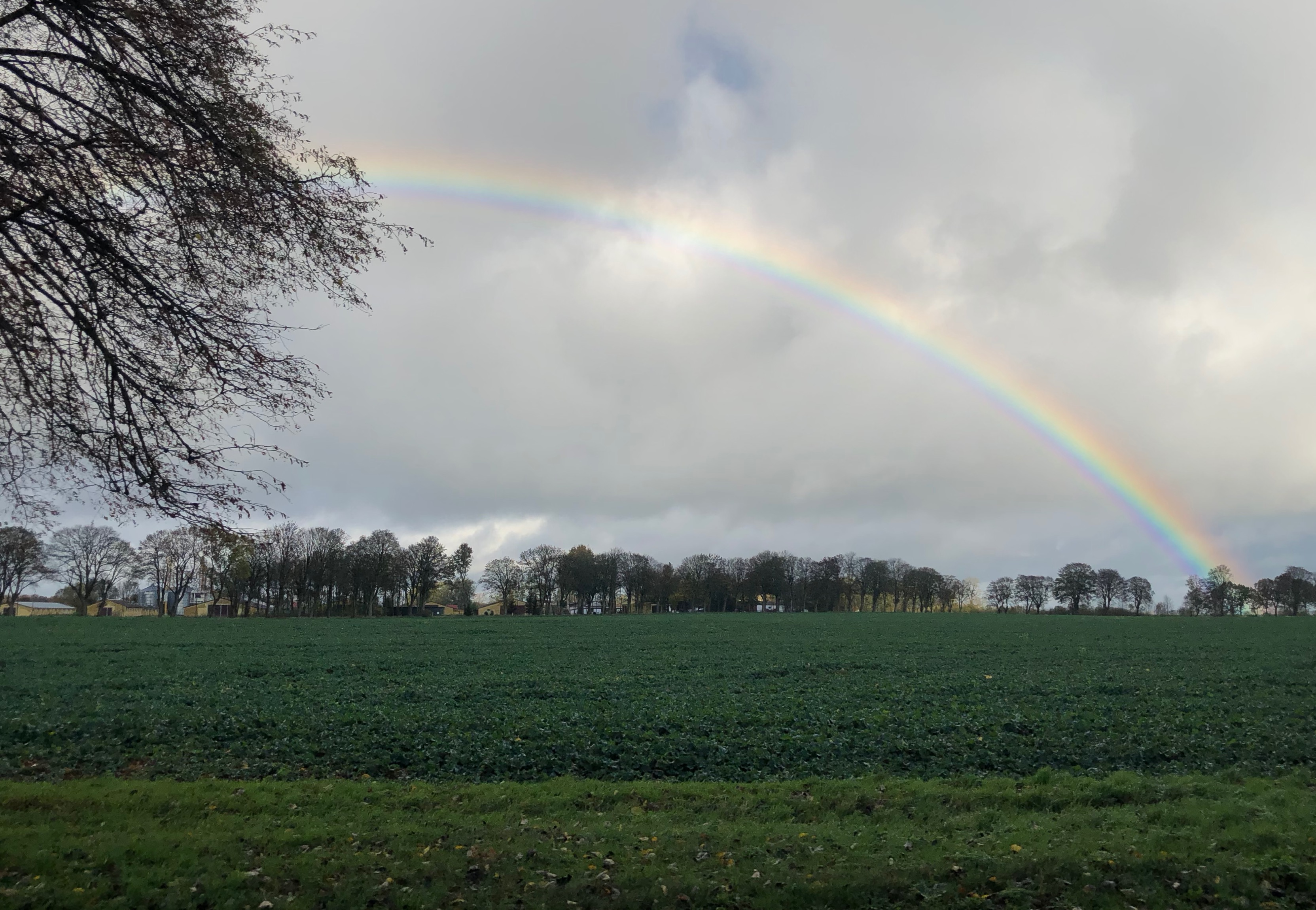 Wielogłowy, widok z DK6/E28